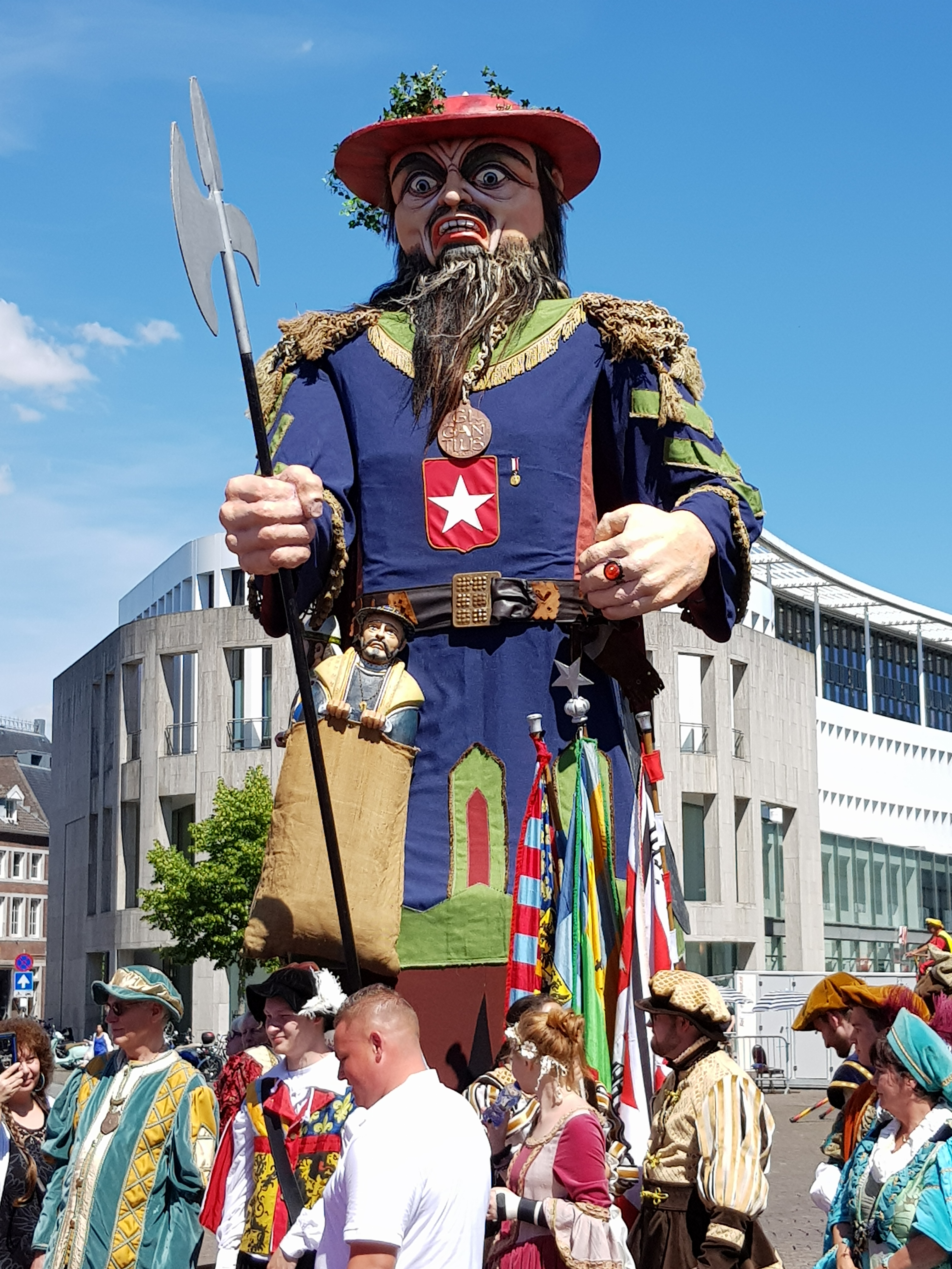 Un géant pendant la parade à Maastricht en juin 2019.